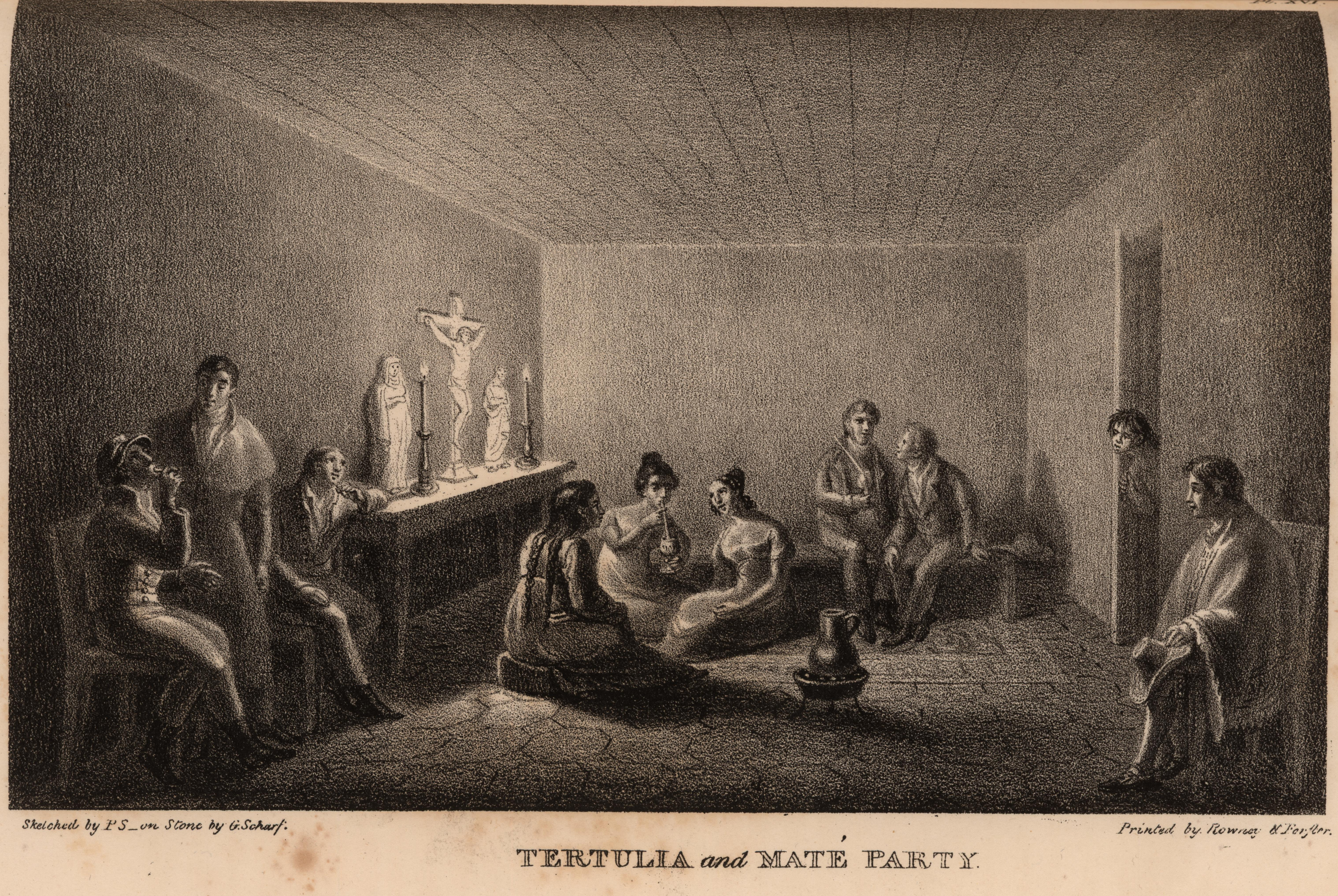 Tertulia en Asiento de Santa Rosa del Huasco, hoy Freirina, pueblo de la provincia de Huasco, región de Atacama, Chile; dibujo del viajero y filántropo inglés Peter Schmidtmeyer; litografía de George Johann Scharf; impresa por Rowney & Forster y publicada en el libro de Schmidtmeyer Travels into Chile, over the Andes, in the years 1820 and 1821, London: Longman, Hurst, Rees, Orme, Brown and Green, 1824.